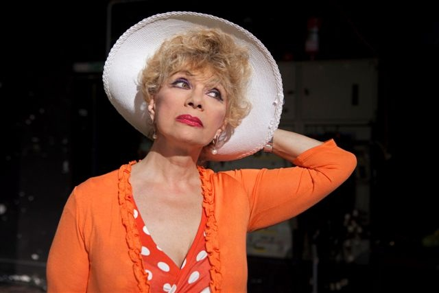 מוניקה ורדימון בהצגה ספסל הזהב מאת רון קלארק בתיאטרון יידישפיל